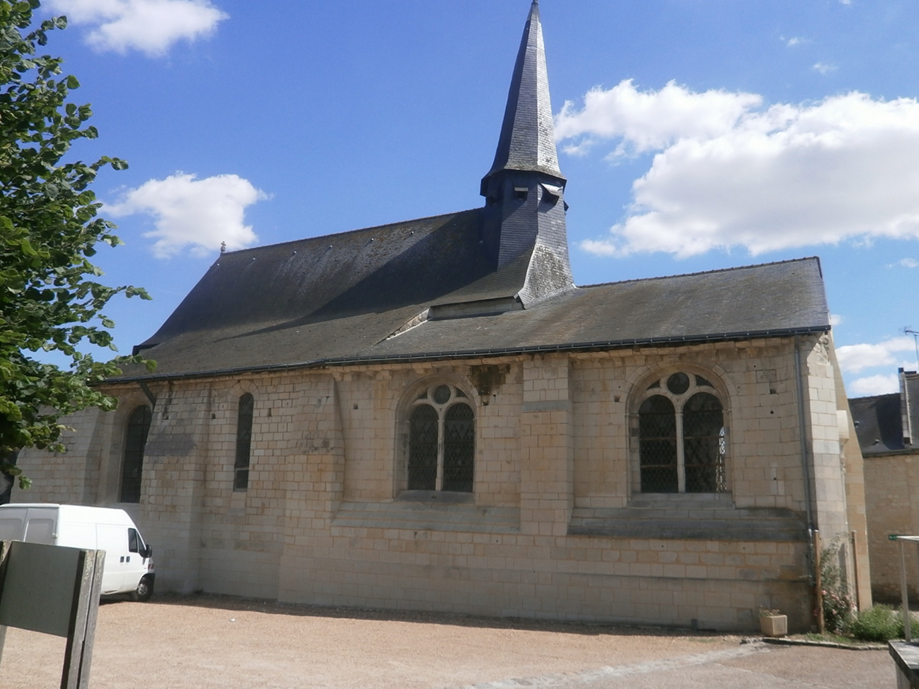 L'église Saint-Martin de Lerné